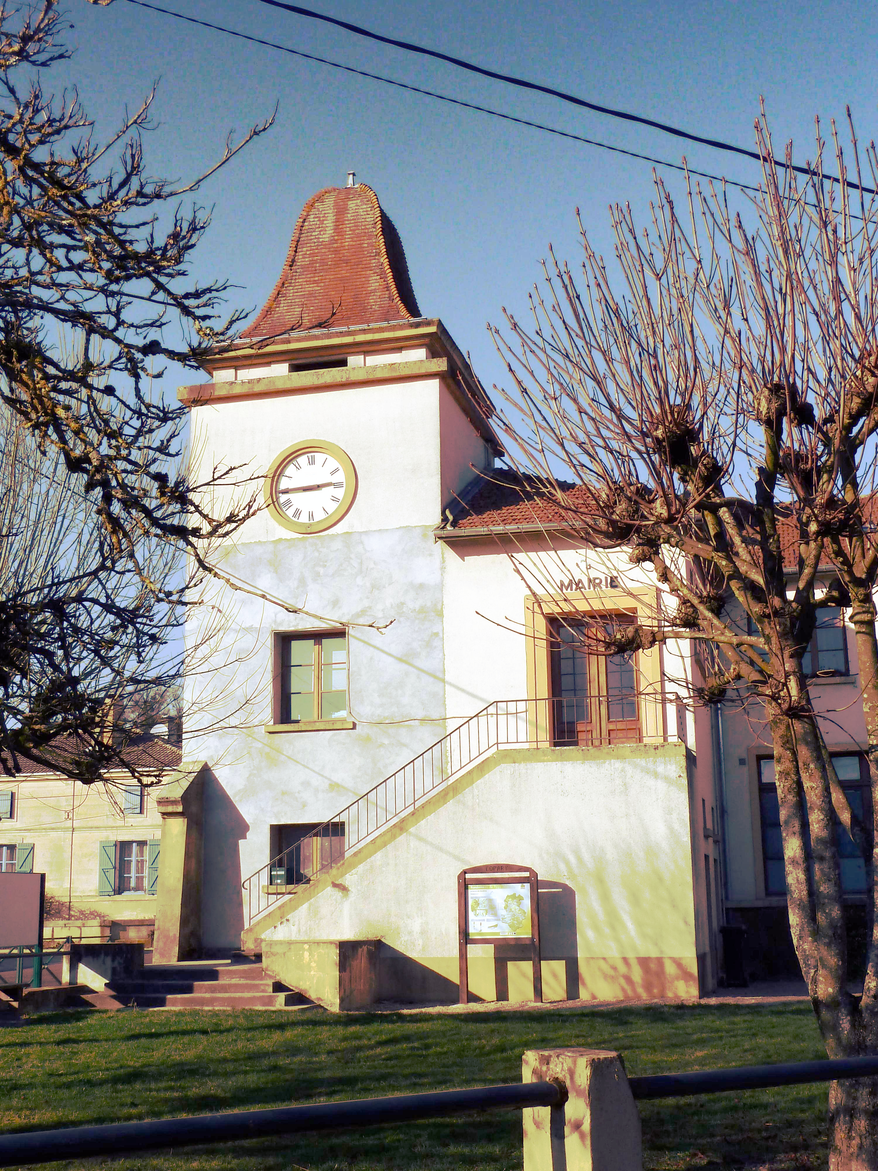 France, Nettancourt, Meuse (55) - la mairie, 2 rue de la Halle. On remarque que celle-ci n'est pas du tout accessible aux handicapés, puisqu'elle nécessite de traverser un pré, puis de grimper un long escalier.